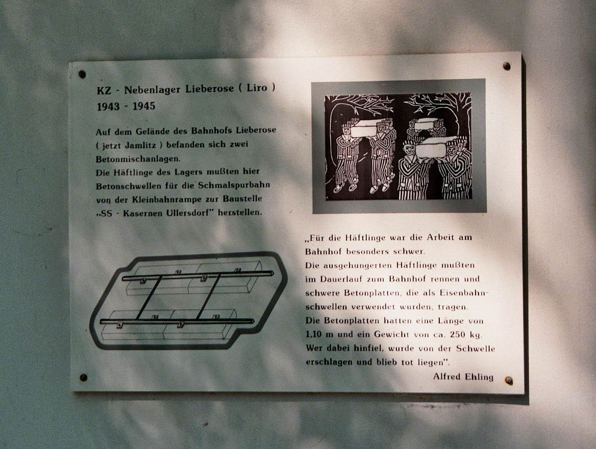 Erläuterungstafel an der Außenwand der Museumsbaracke der Gedenkstätte Arbeitslager Lieberose 1943-1945 in Lieberose, Landkreis Dahme-Spreewald, Brandenburg, Deutschland.